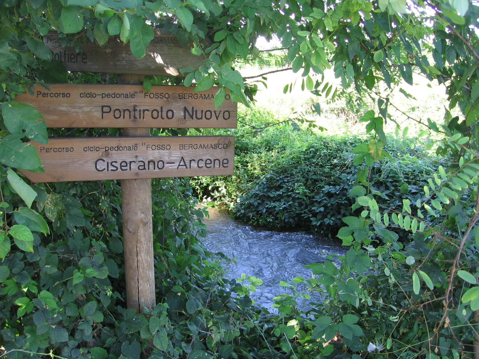 Fosso bergamasco tra Pontirolo Nuovo, Ciserano e Boltiere (Bergamo)